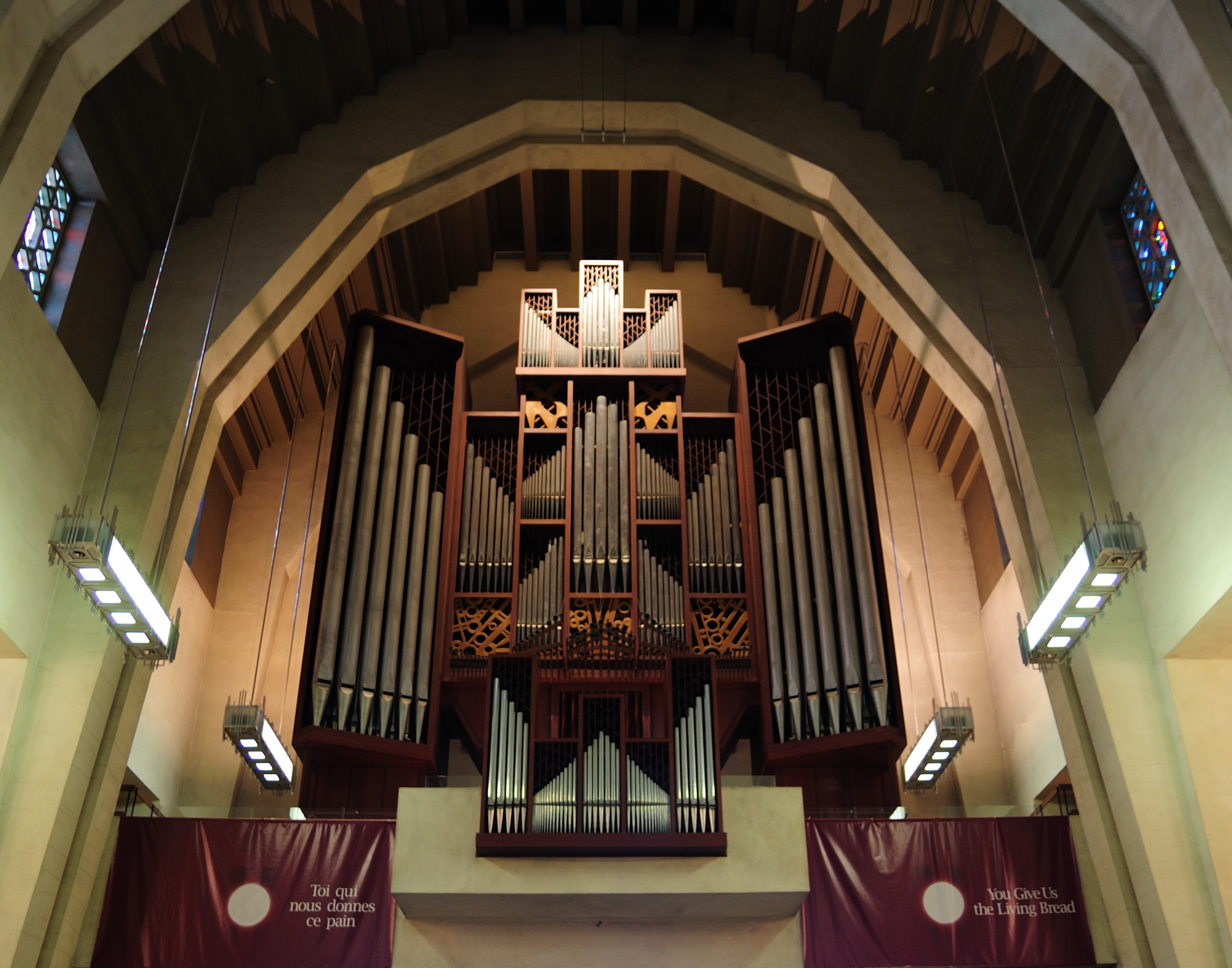 Montreal: Orgel des St.-Josephs-Oratorium